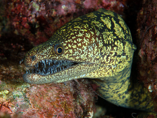 コケウツボ Enchelycore lichenosa